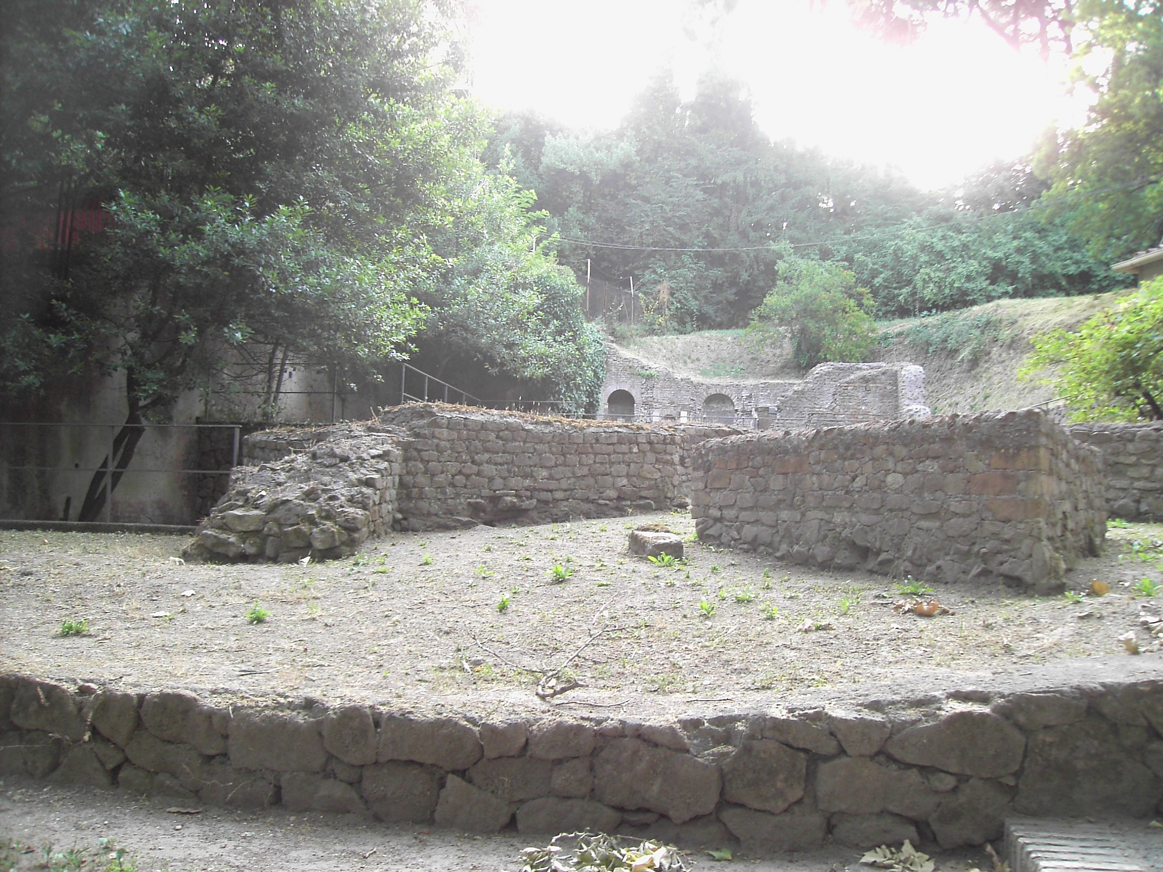 Roma, resti del Santuario Isiaco al Gianicolo (via Dandolo)